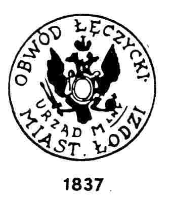 Pieczęć Miasta Łodzi z 1837 roku